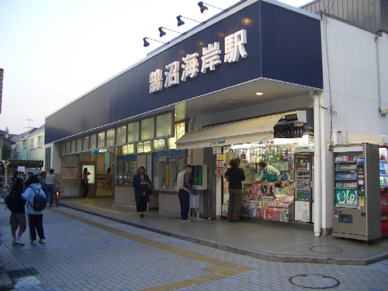 Kugenuma-Kaigan Station, on the Odakyu Enoshima Line, Fujisawa, Kanagawa 鵠沼海岸駅